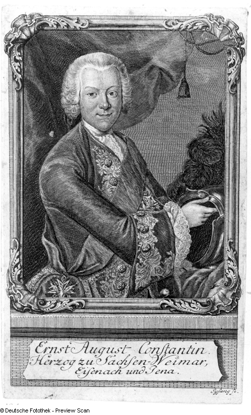 Ernst August II.